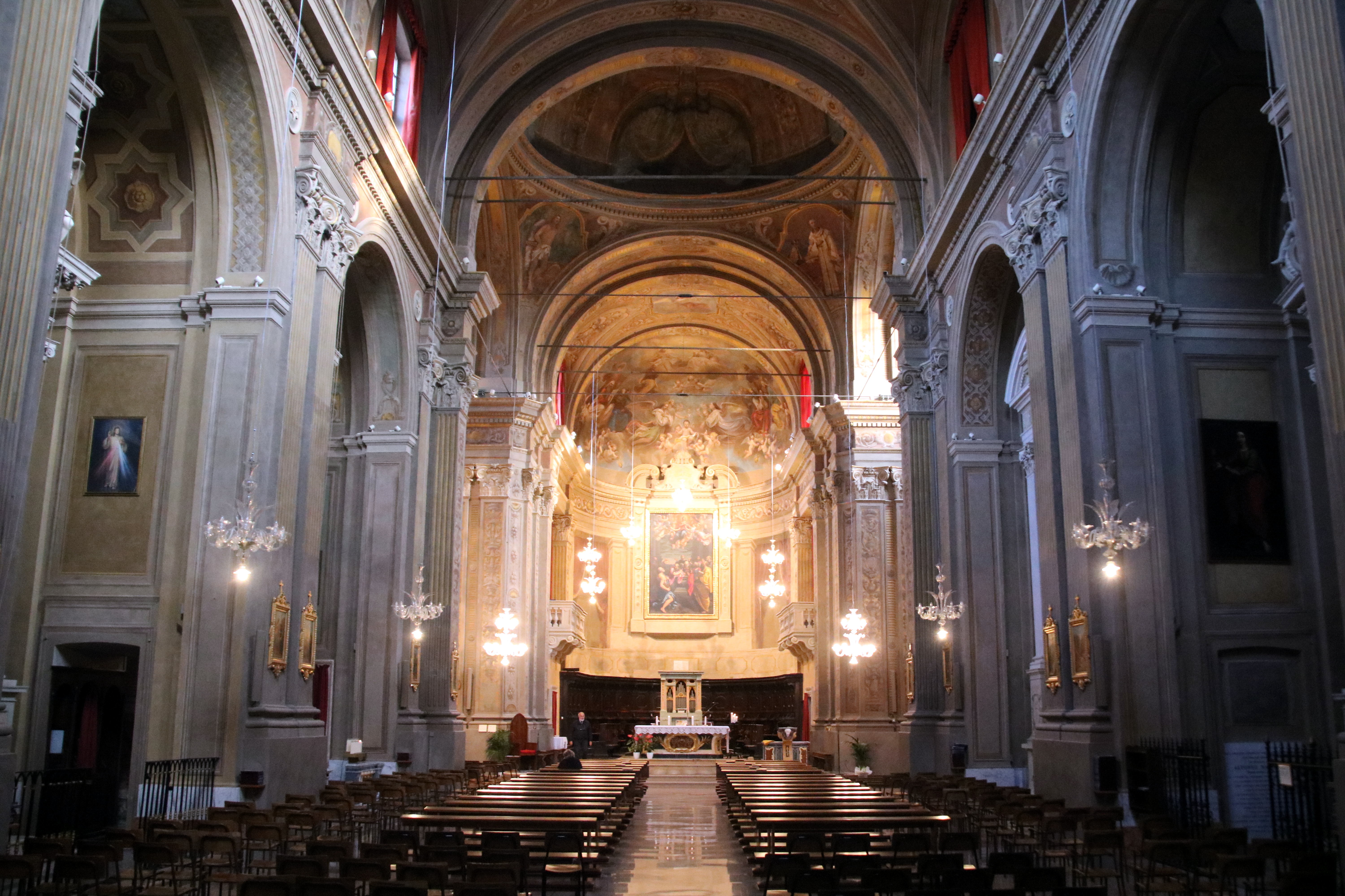 Collegiata di Santa Maria Maggiore (Pieve di Cento), interno